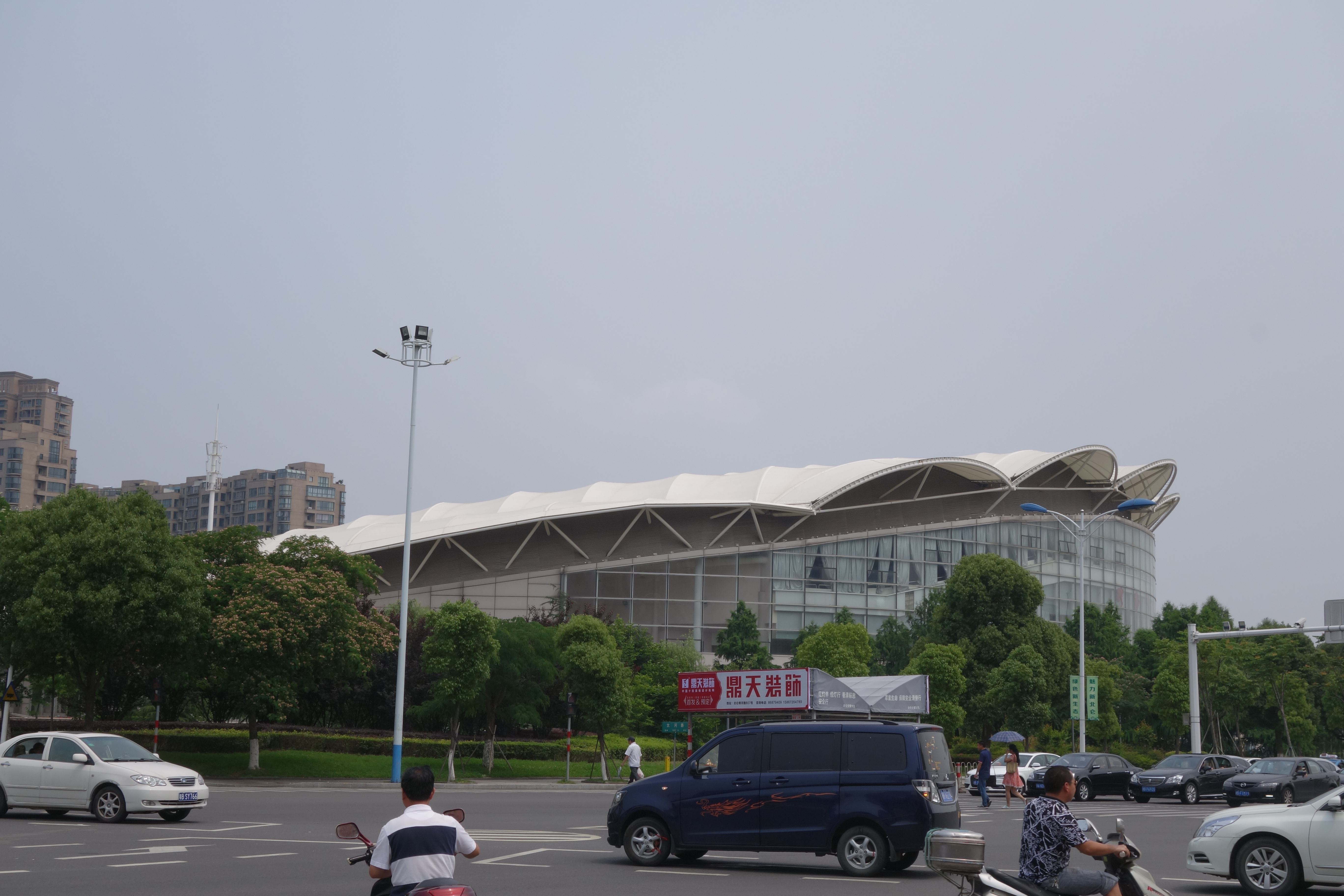 北仑体艺中心